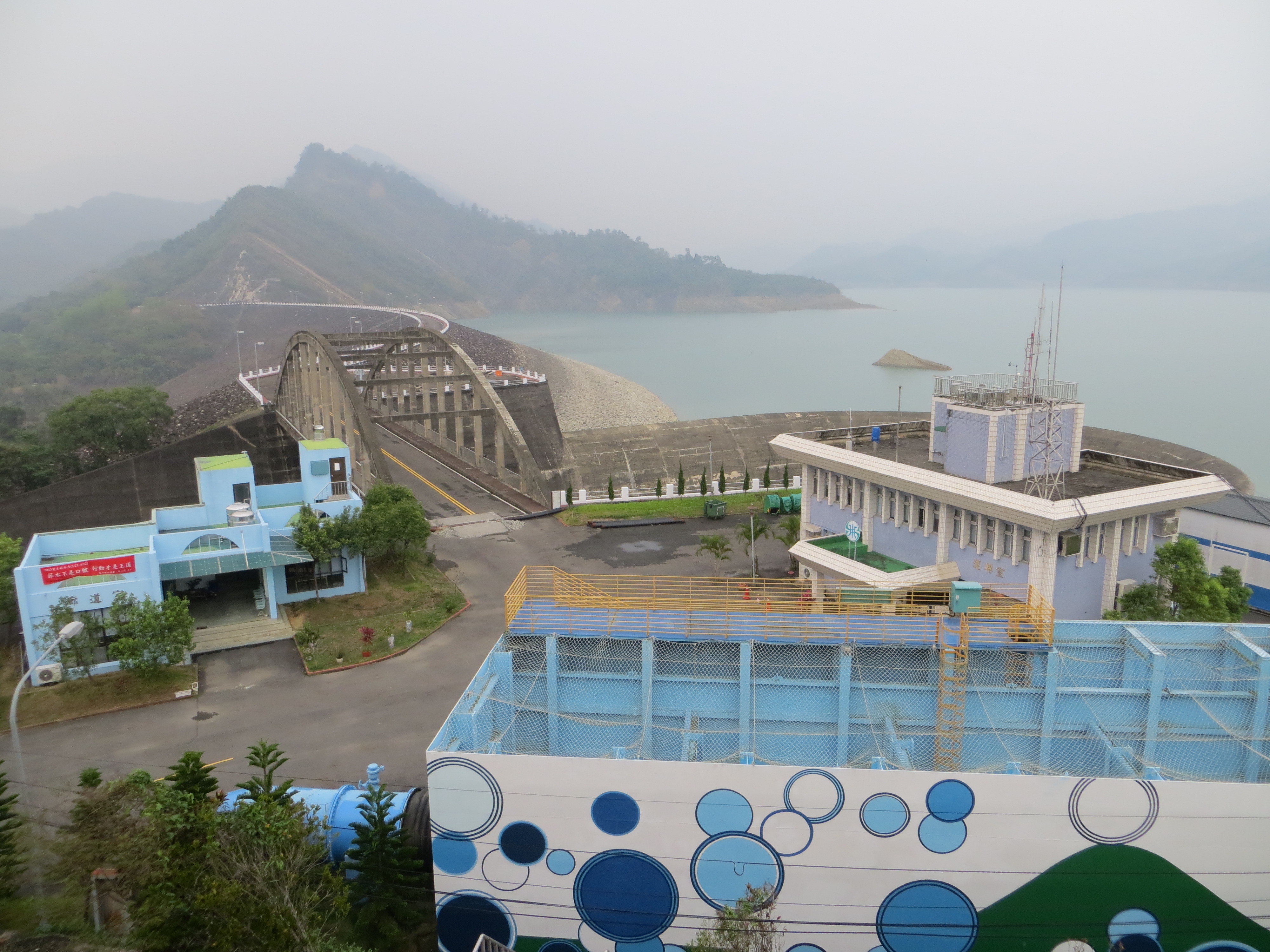 南化水庫大壩區域，以水泥拱橋跨溢洪道後即為主大壩。現為管制區，外人不得自由進入。